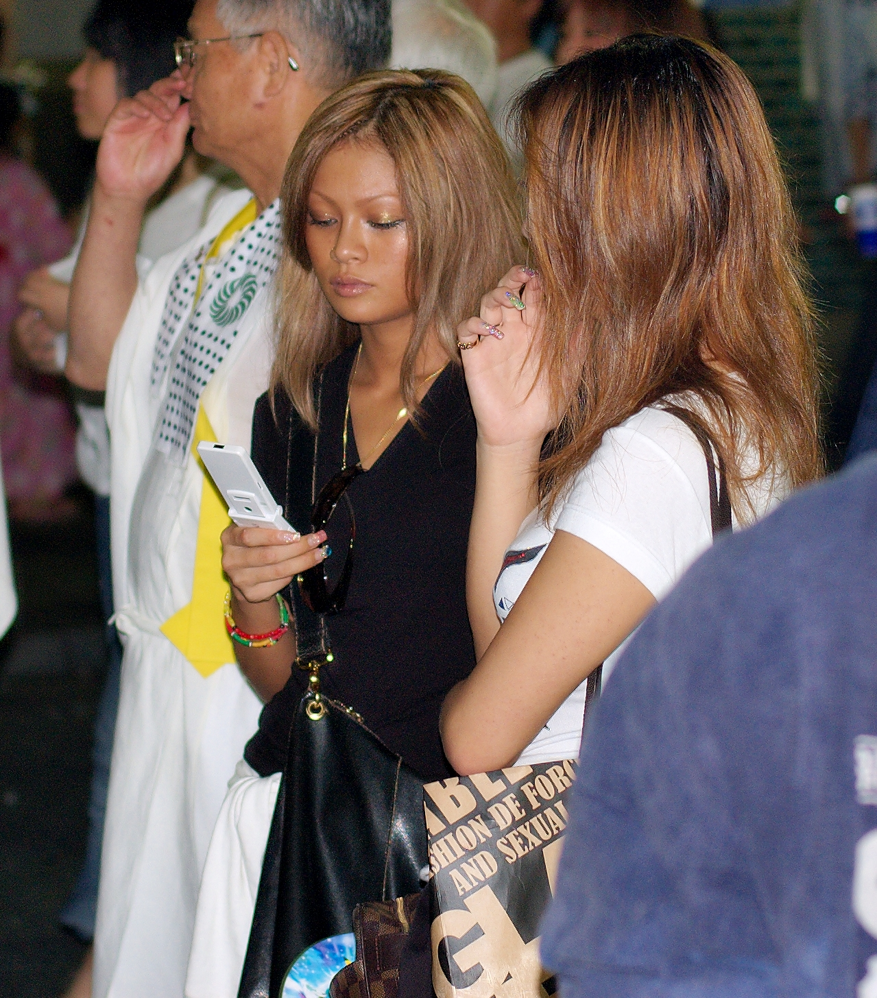 Girls